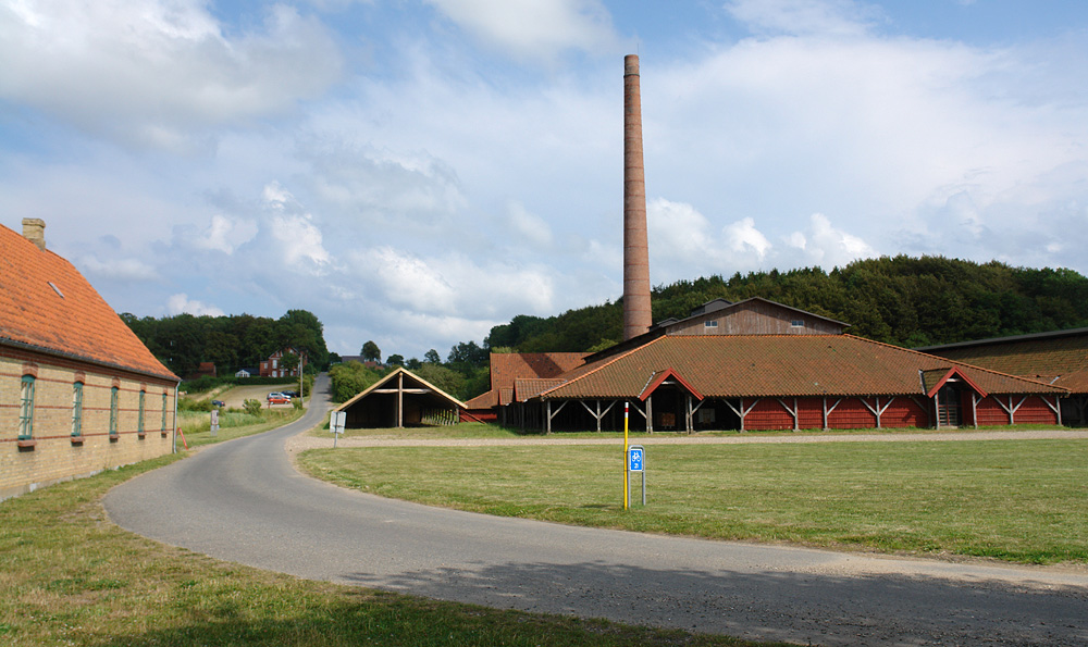 Cathrinesminde Teglvaerk an der Flensburger Förde. Als Ziegelei gegründet 1732, stillgelegt 1968. 1986 bis 1993 restauriert, heute Ziegeleimuseum